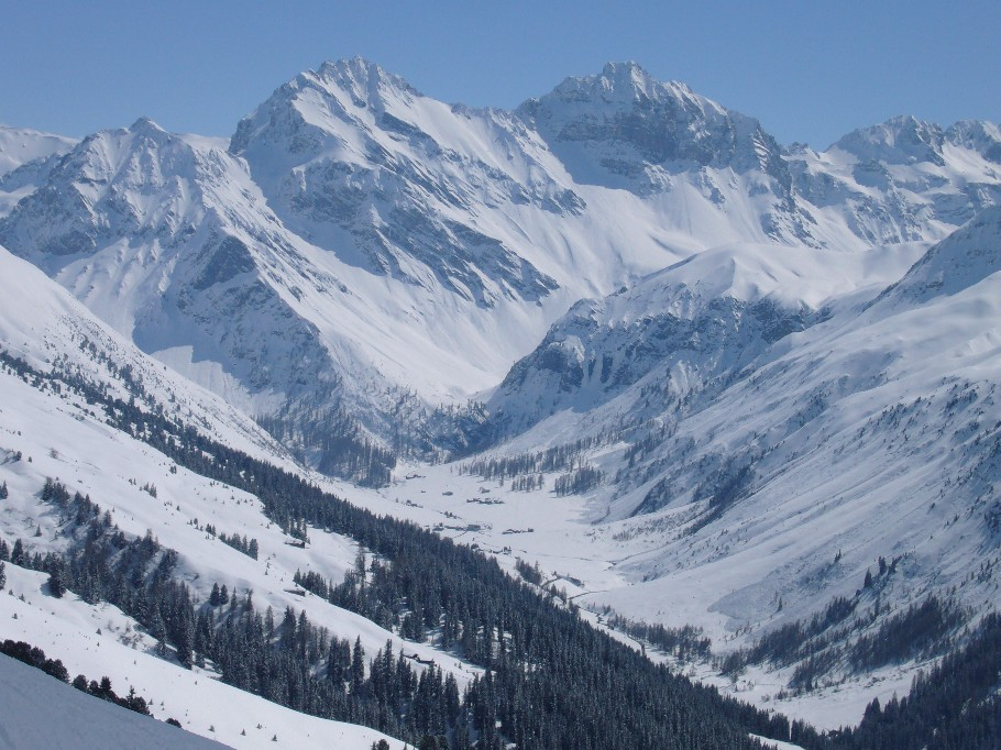 Sertigtal vom Sessellift Jatz aus gesehen